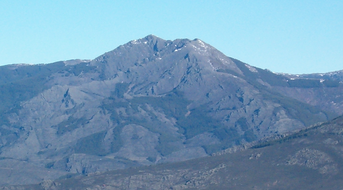 Peña de La Cabra, cara Sur.